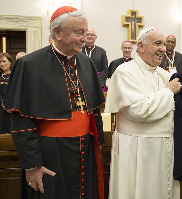 187 países unidos contra el crimen campaña de Interpol, #TurnBackCrime